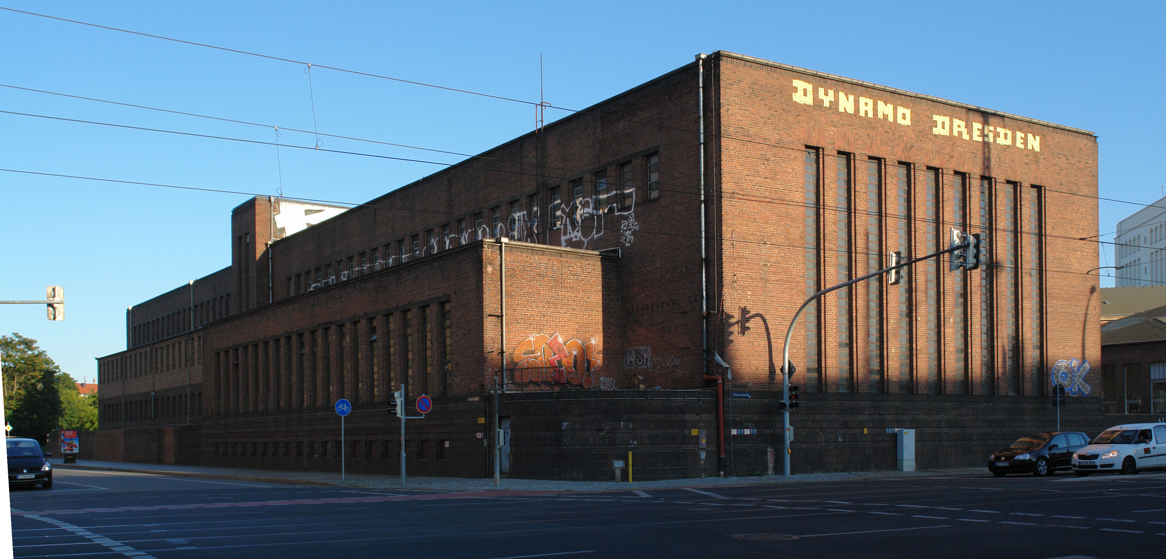 Heizkraftwerk Dresden-Mitte